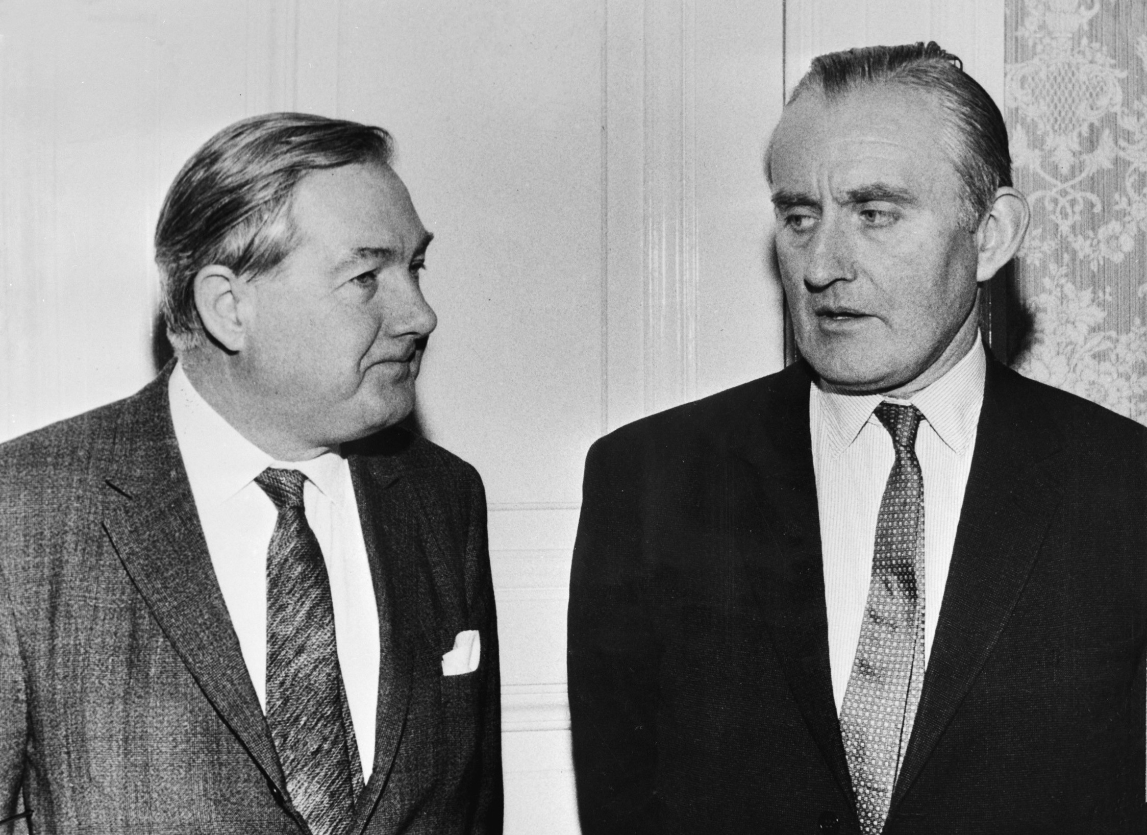 (Links) ex-minister Calaghan van Engeland en (rechts) premier Chichester Clark van Noord-Ierland